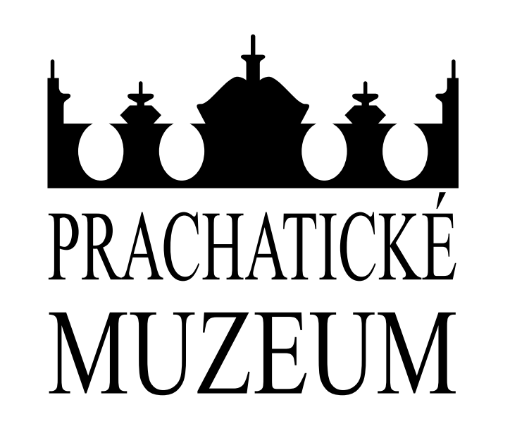 Logo Prachatického muzea.